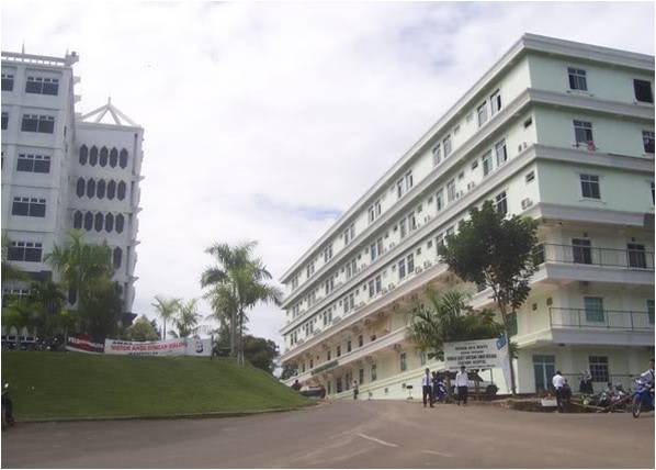 Unimal